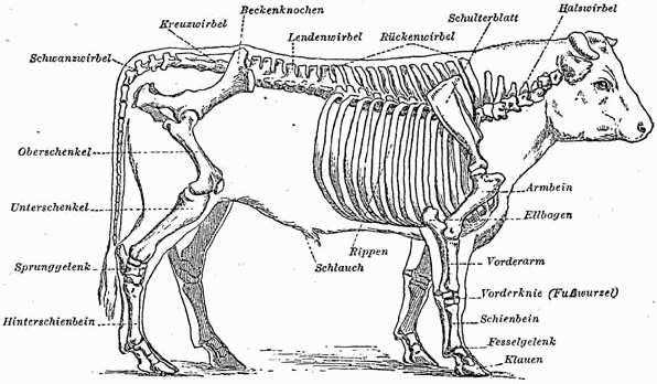 Teile des Rindes